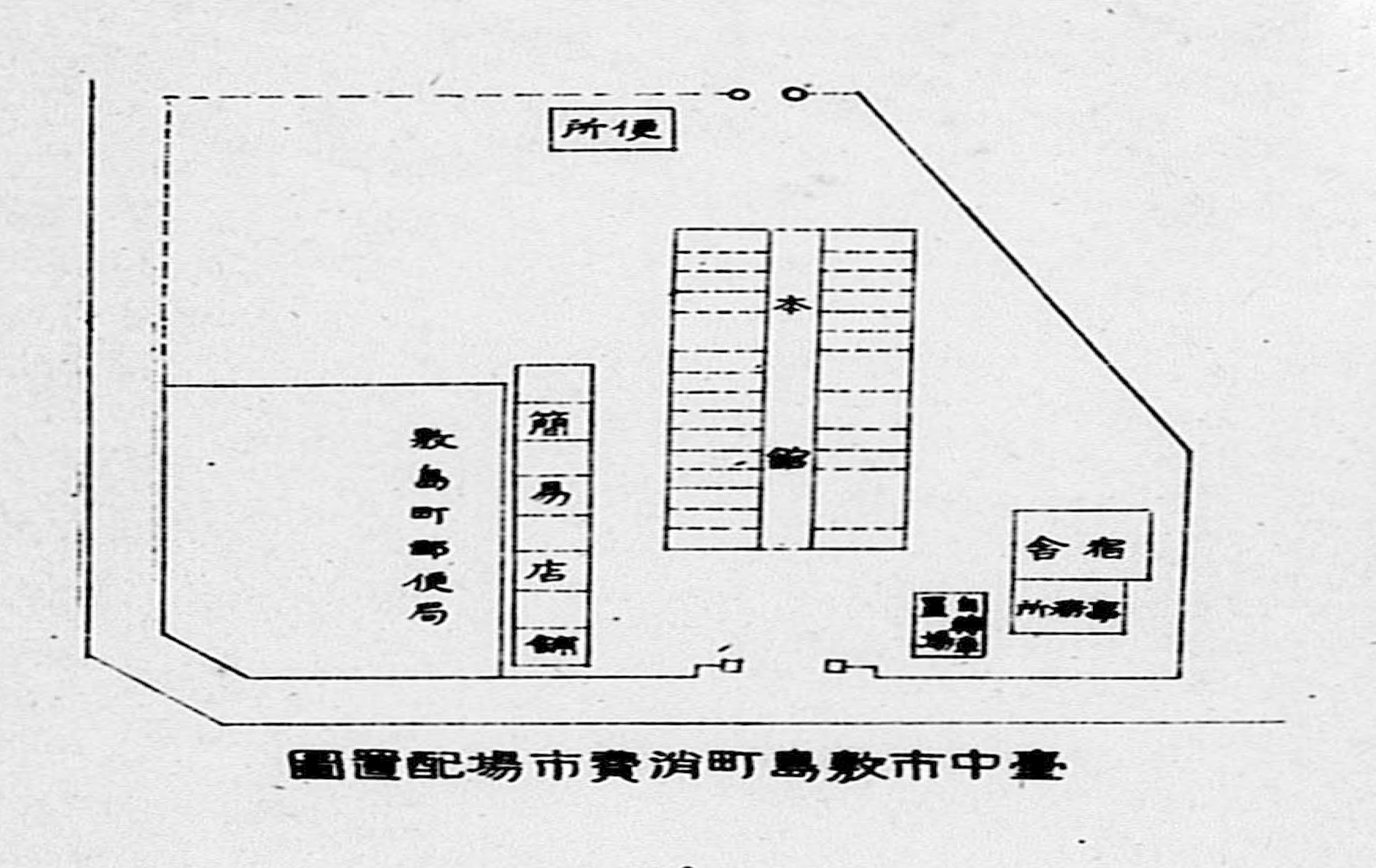 臺中市敷島町消費市場為臺中市第四市場